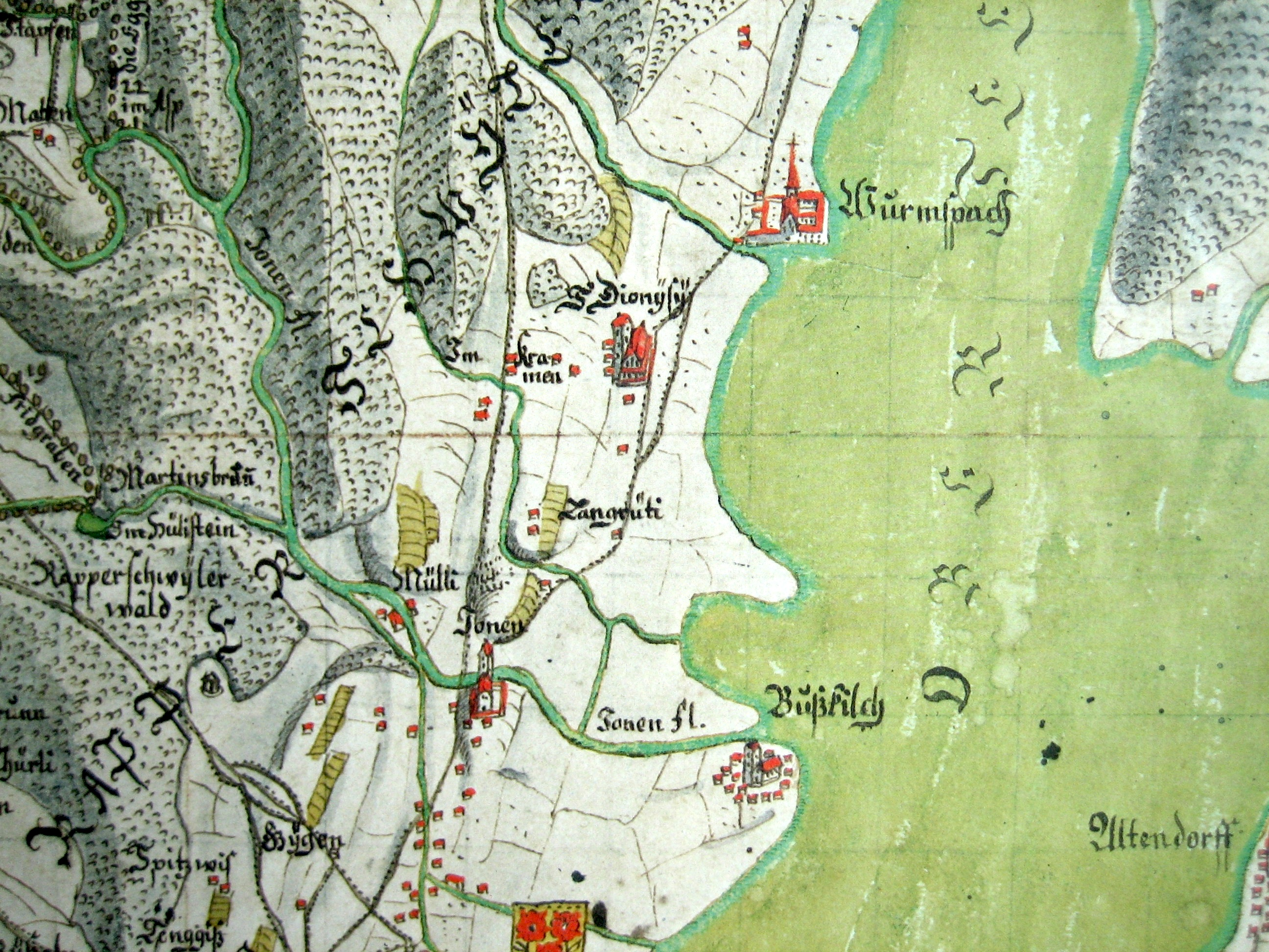 Region Rapperswil/Obersee und Kloster Mariazell-Wurmsbach (SG) auf der Umzeichnung des Gygerplans von 1667 im 18. Jahrhundert